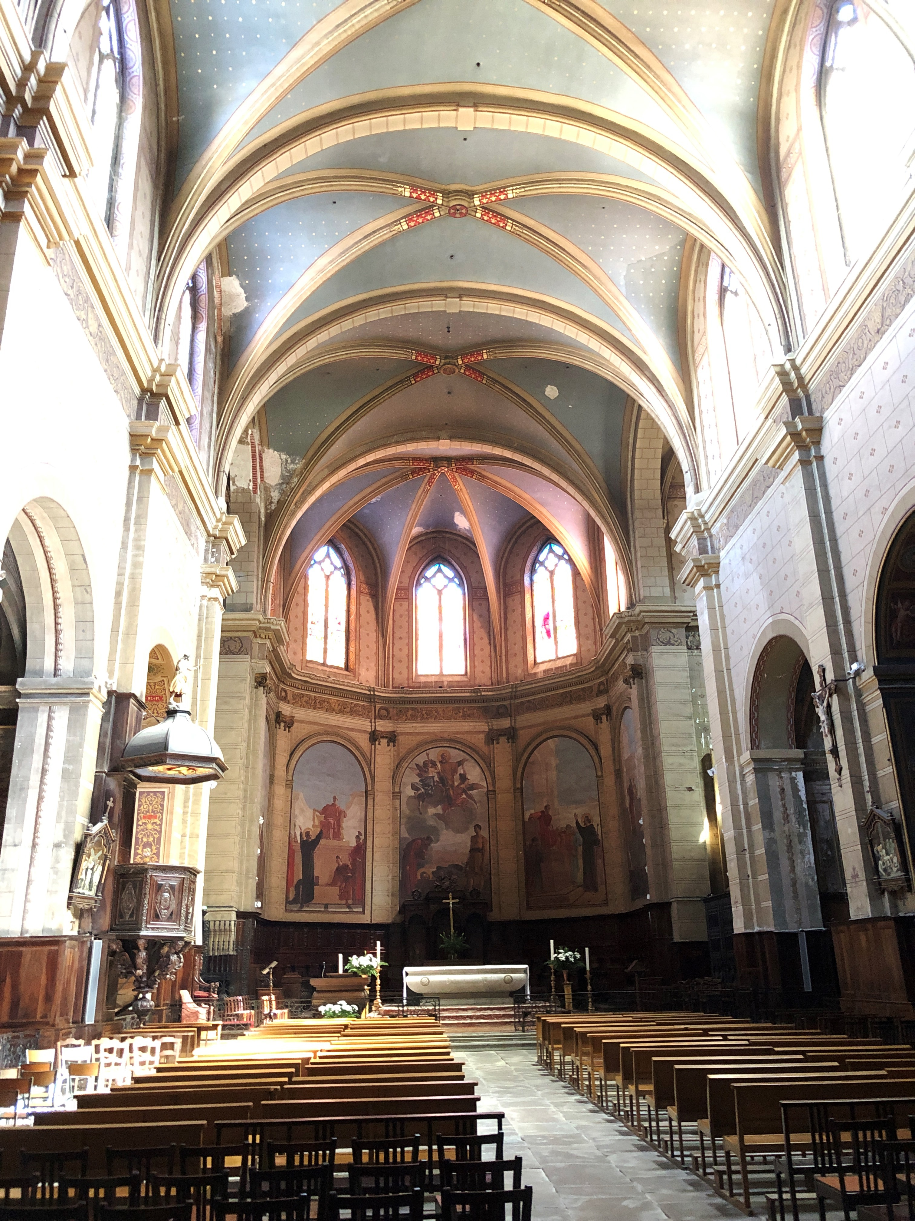 Catedrala Sant Antonin de Pàmias - nau